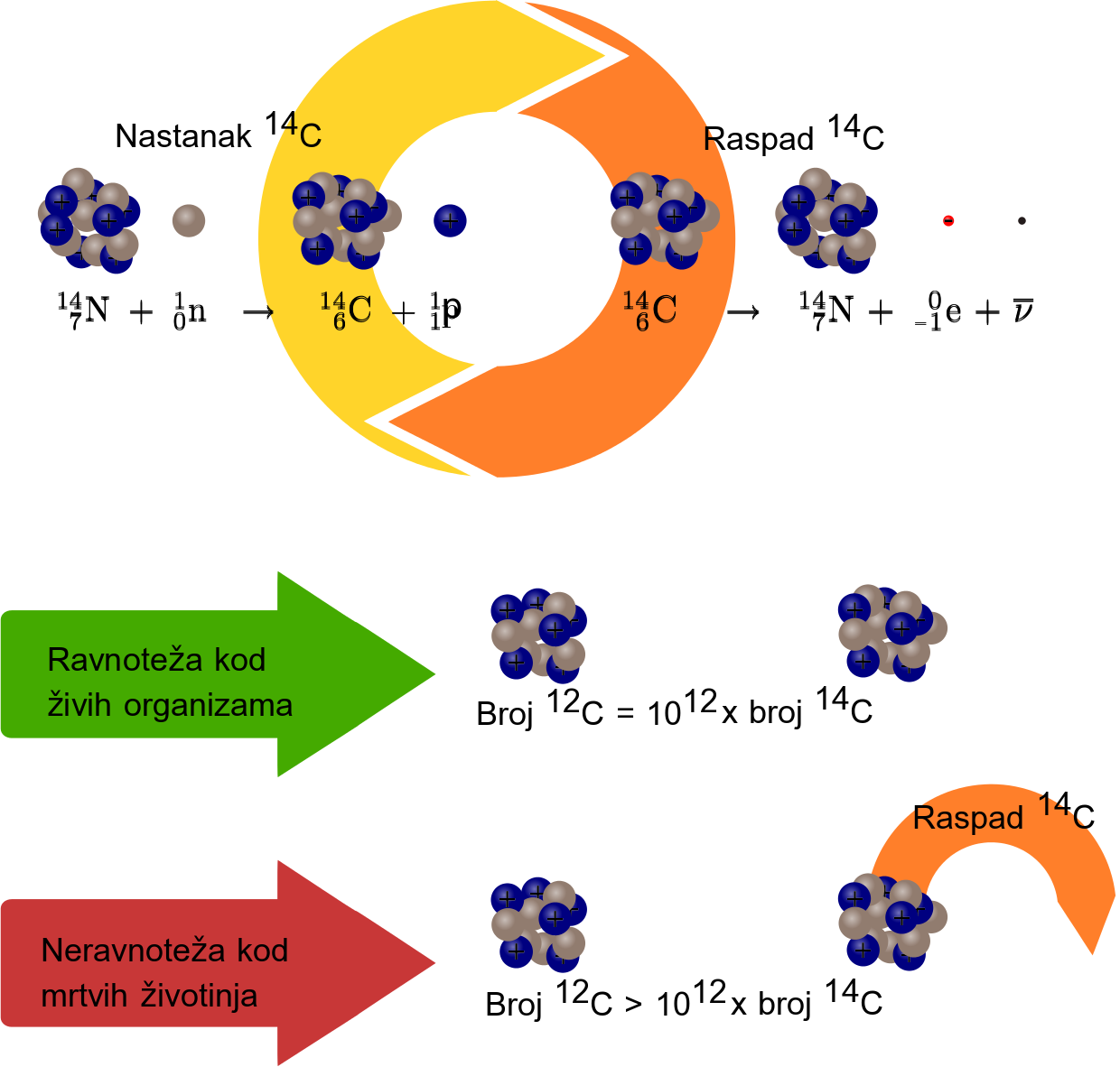 Fizikalna osnova C14 metode